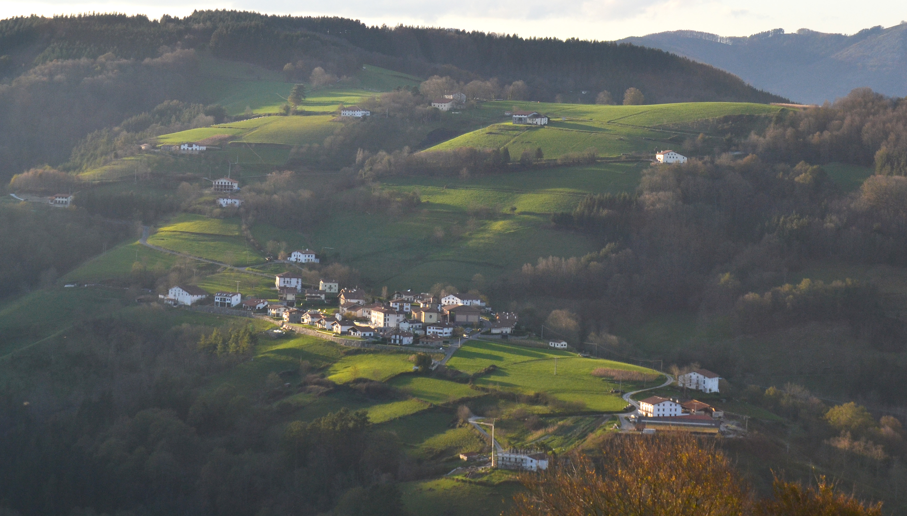 Baliarrain, Gipuzkoa. Euskal Herria. Baliarrain, Gipuzkoa. Basque Country.